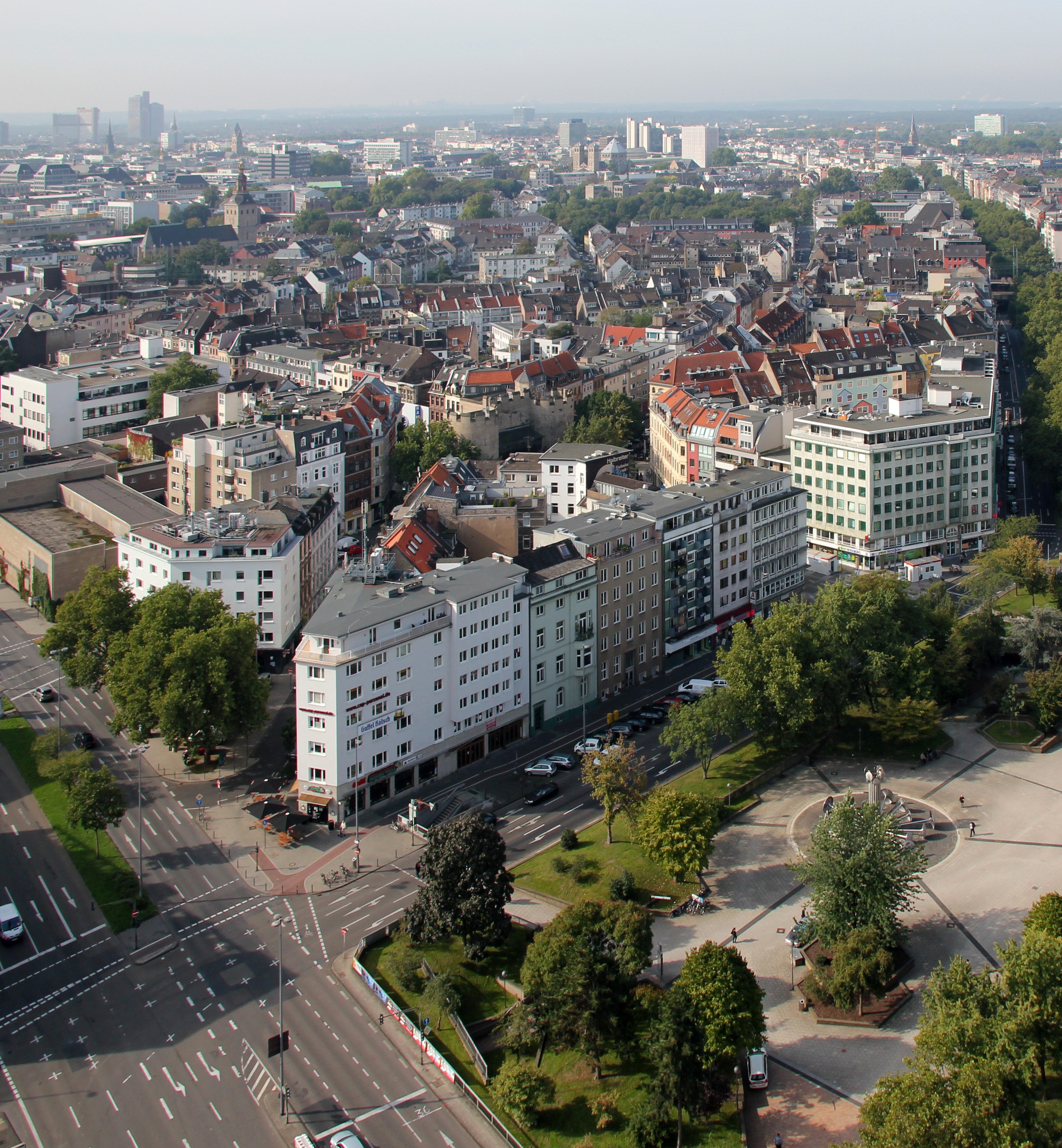 Köln Neustadt-Nord, Ebertplatz Stadtseite